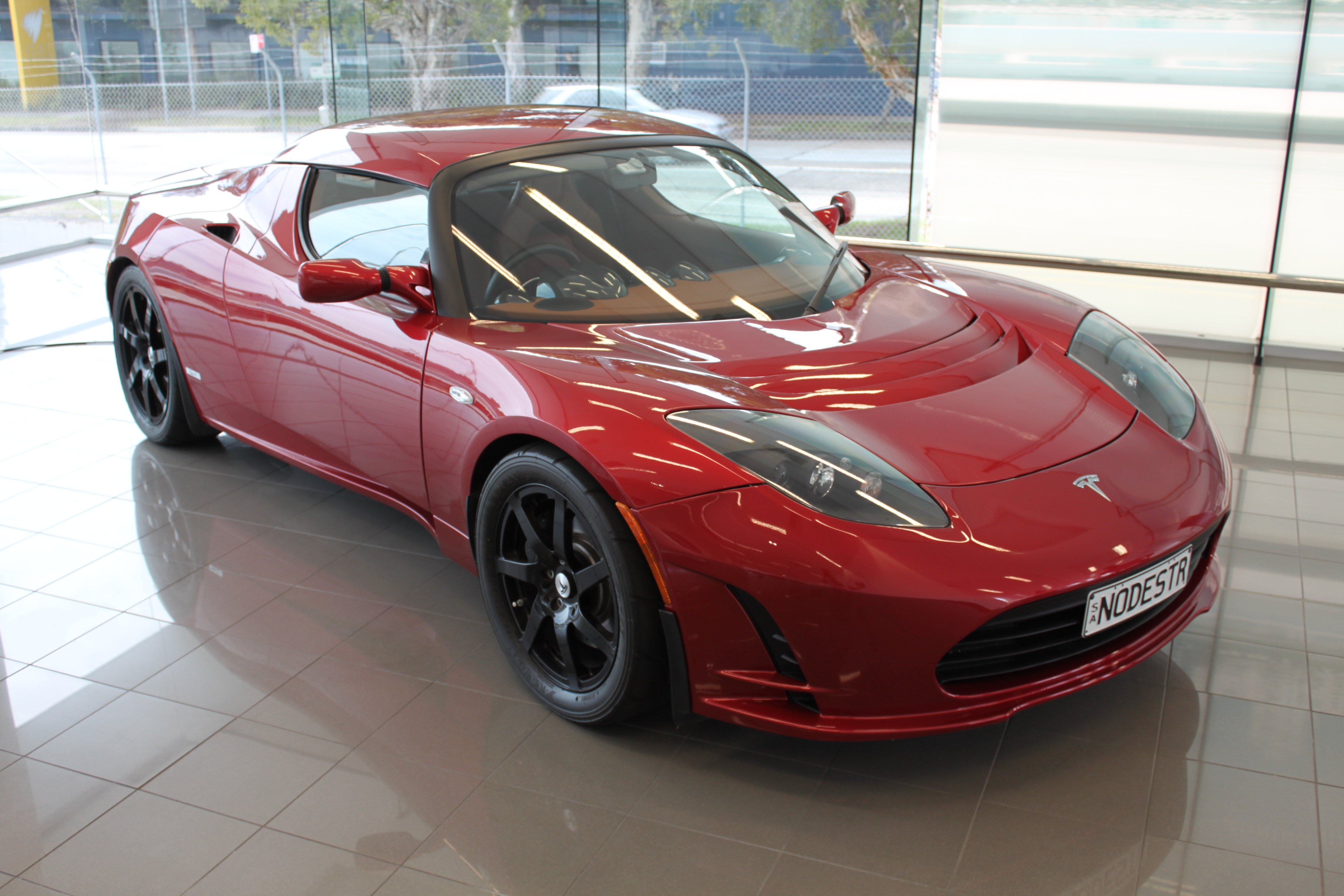 Tesla Roadster